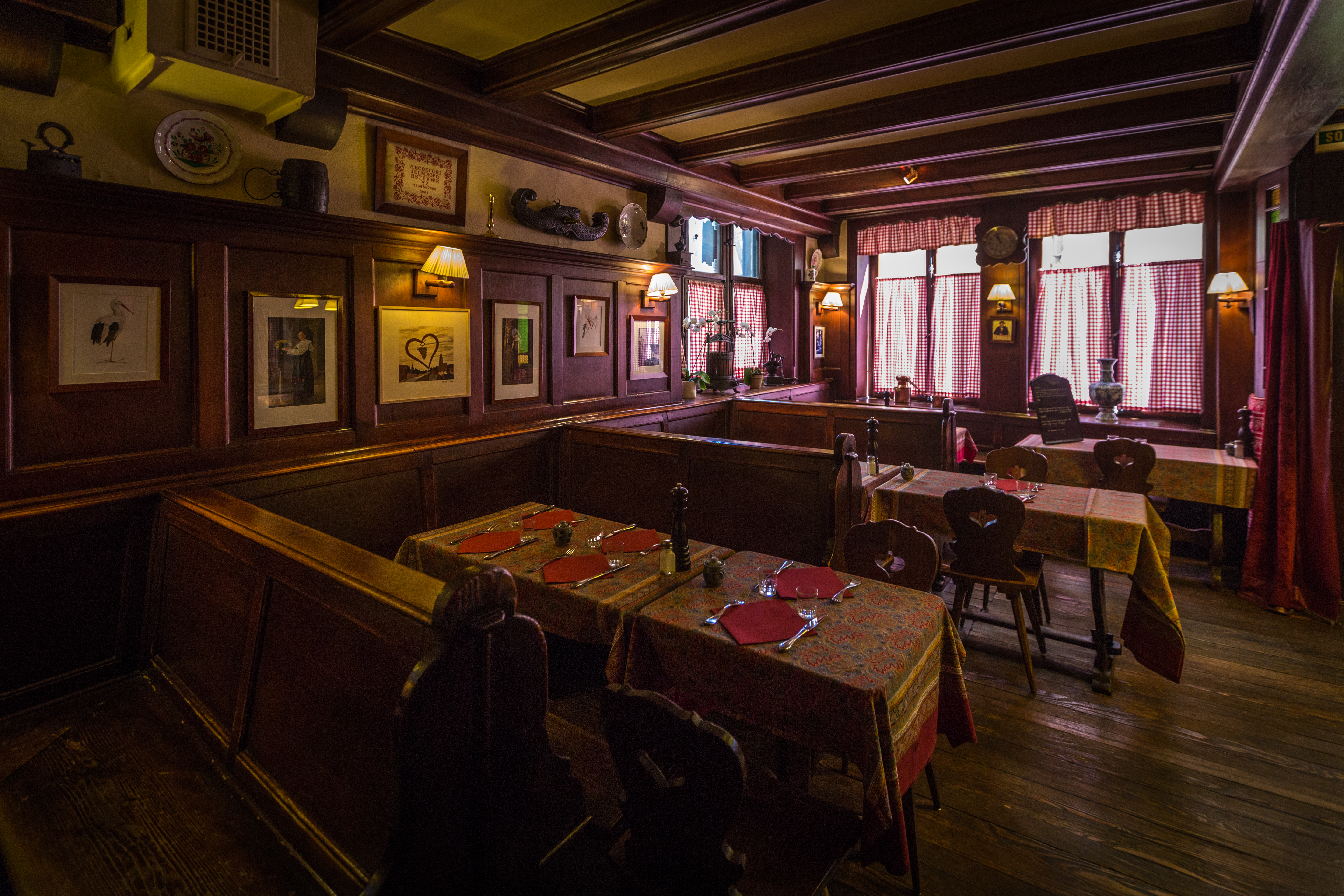 Winstub Chez Yvonne avril 2014